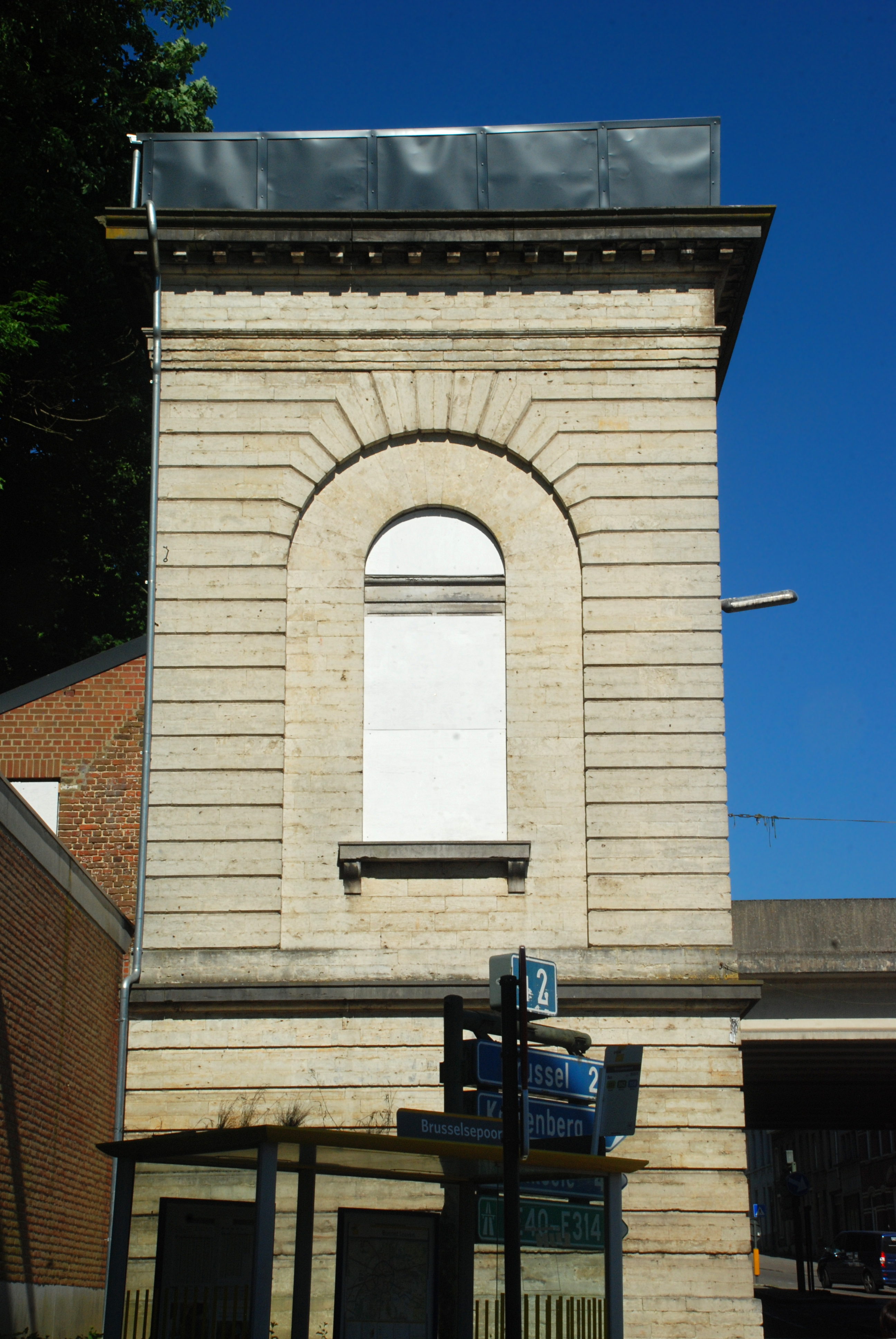 Belgique - Brabant flamand - Louvain - Porte de Bruxelles (néo-classique 1825, architecte Martin Hensmans)